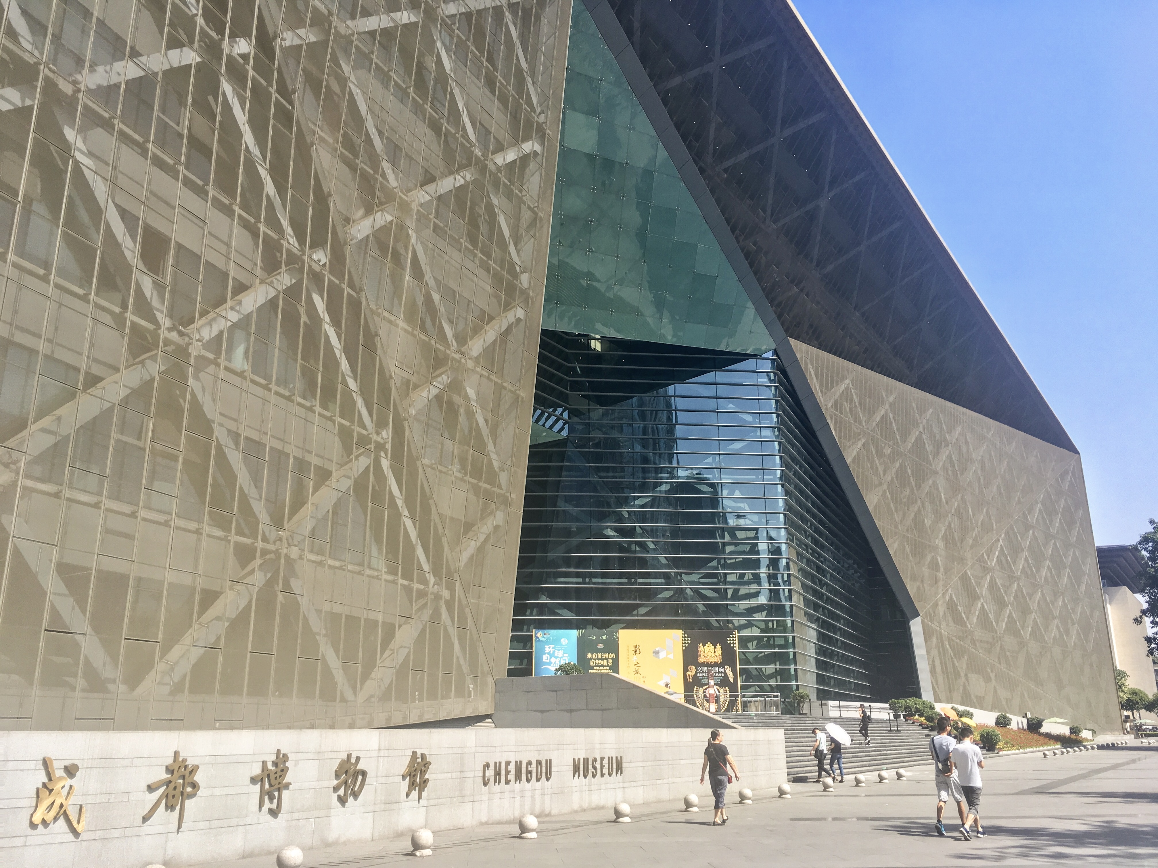 iPhone SE拍摄